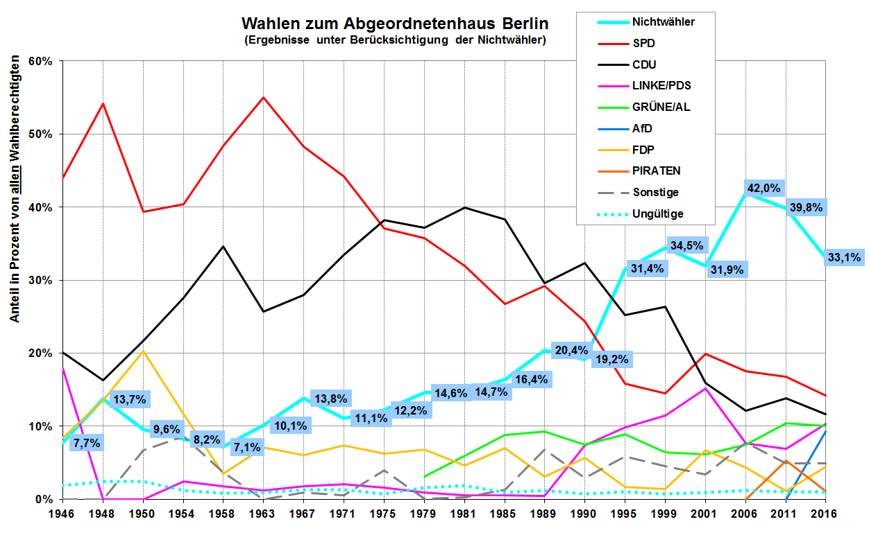 Historie des Anteils der Nichtwähler bei den Wahlen zum Abgeordnetenhaus Berlin